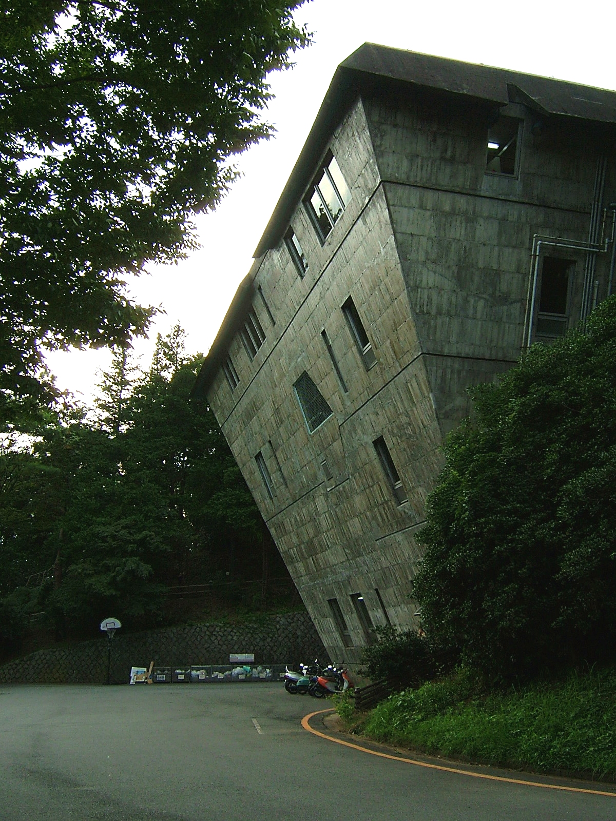 八王子セミナーハウス本館